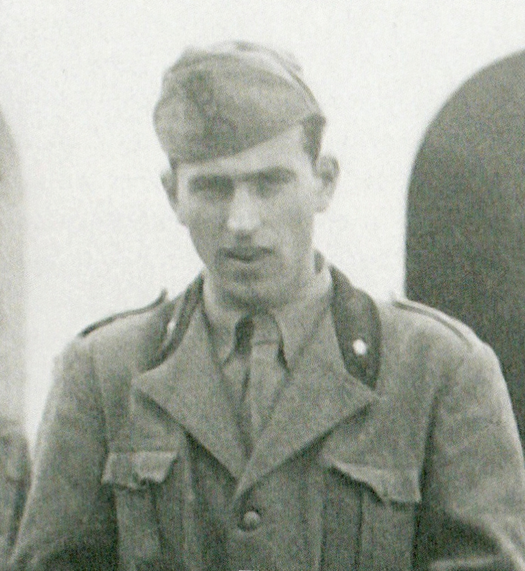 Fiorenzo Magni